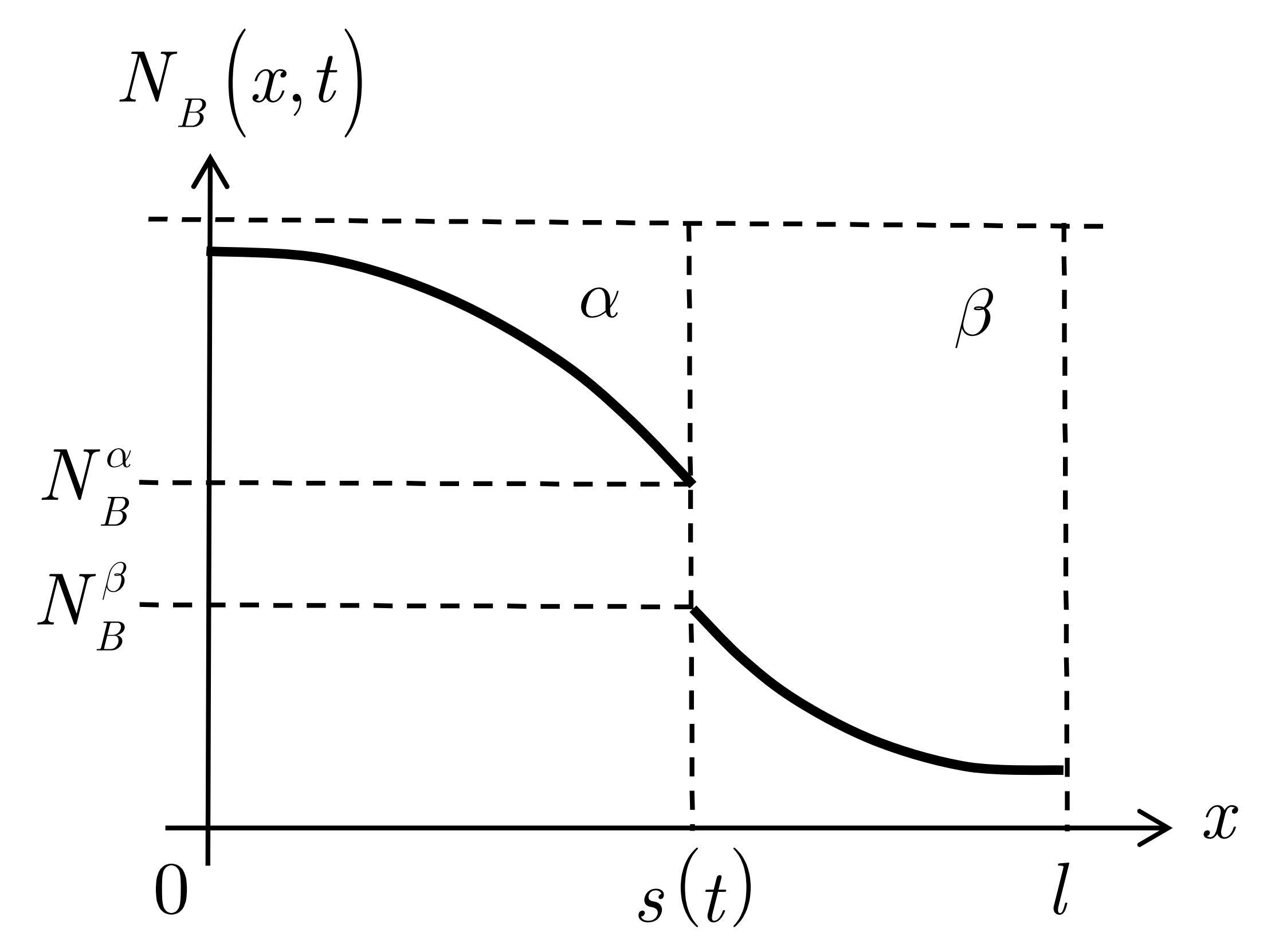 two-phase system